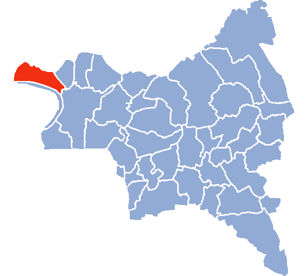 Auteur Hervé SUAUDEAU Licensing Catégorie:Cartes de Seine-saint-Denis Catégorie:Épinay-sur-Seine